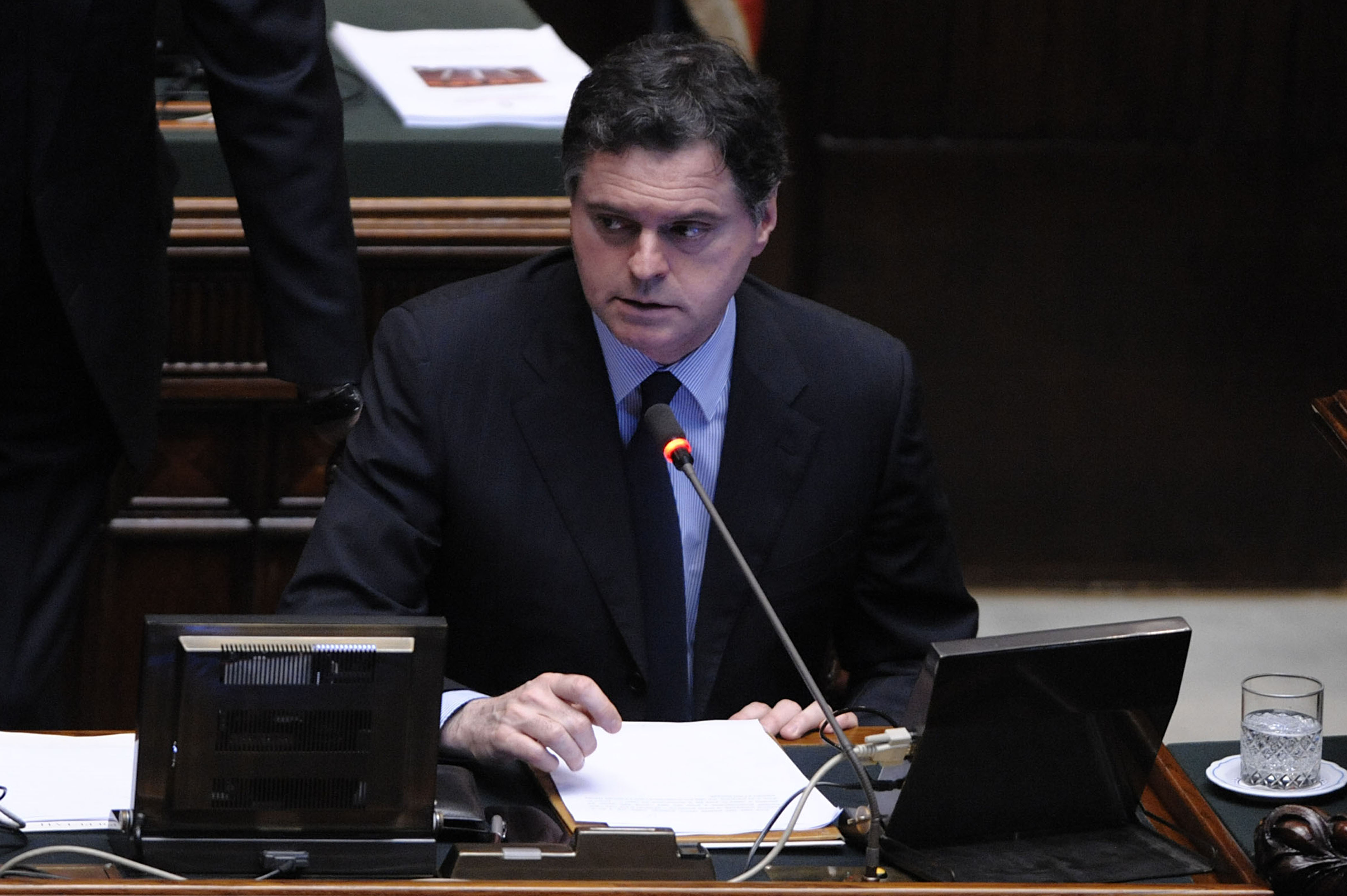 on. Gregorio fontana - Il Popolo della Libertà